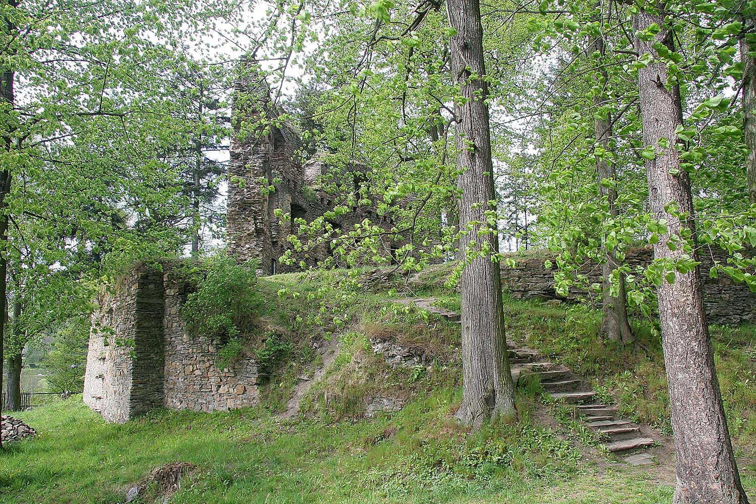 Dalečín - zřícenina hradu Dalečín, okres Žďár nad Sázavou